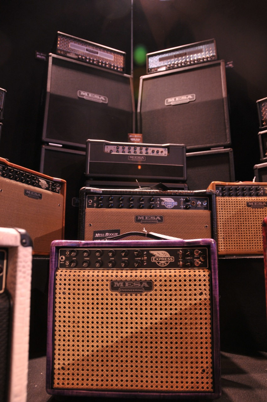 Mesa Boogie Family